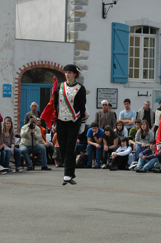 Entseinaria. Larraineko maskarada Barkoxen. 2010-03-27.